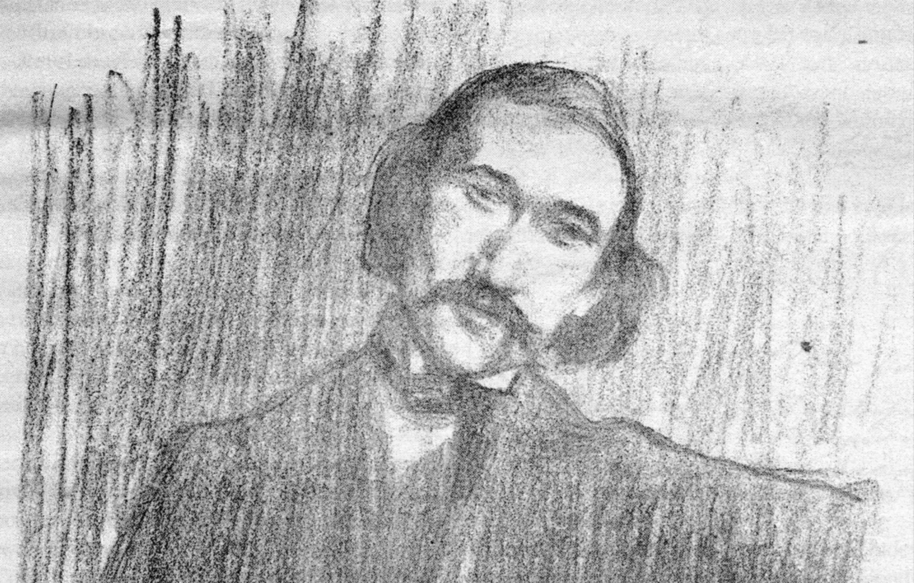 André Gide: pencil drawing